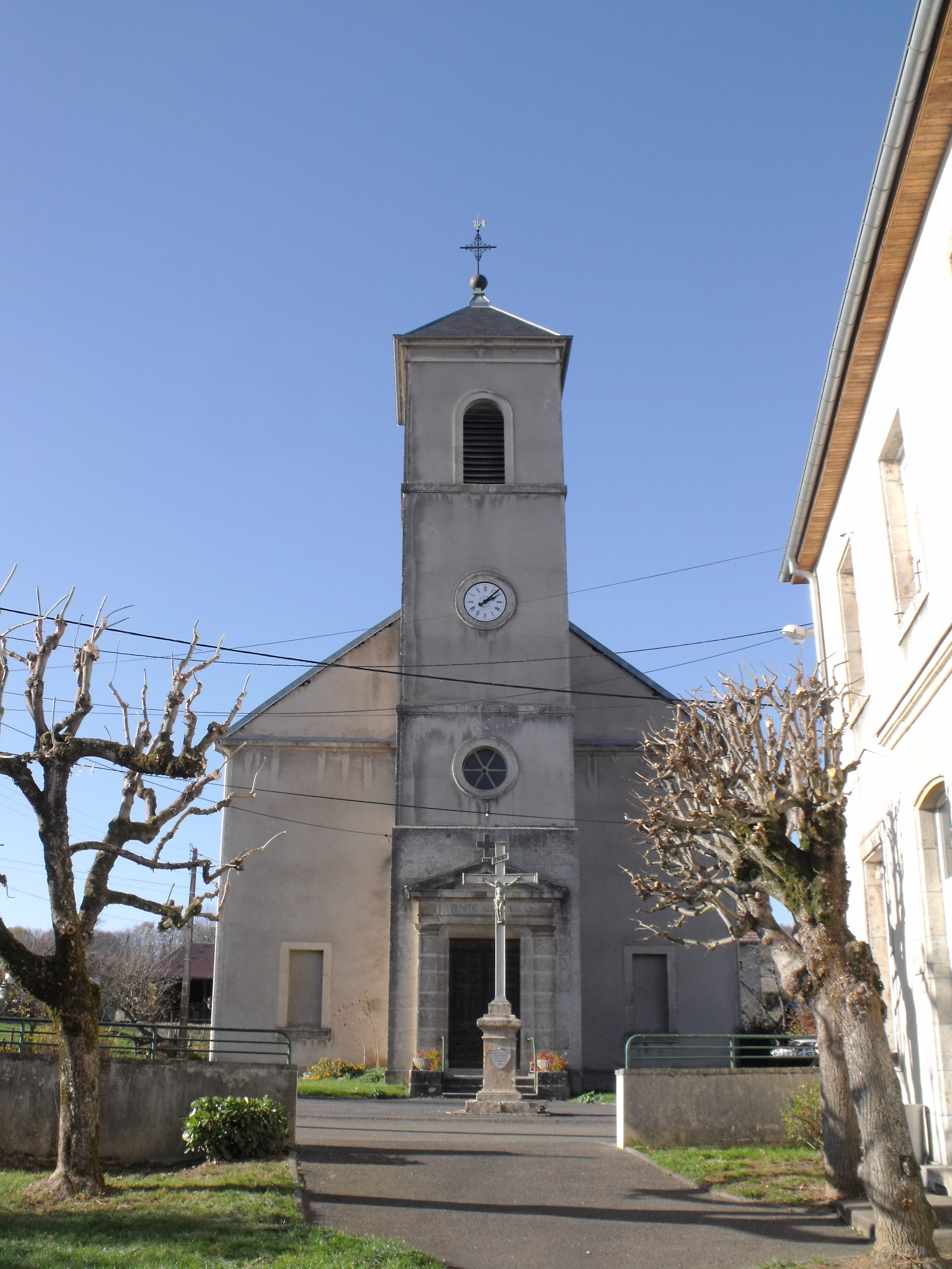 Mairie de Geney, Doubs, France